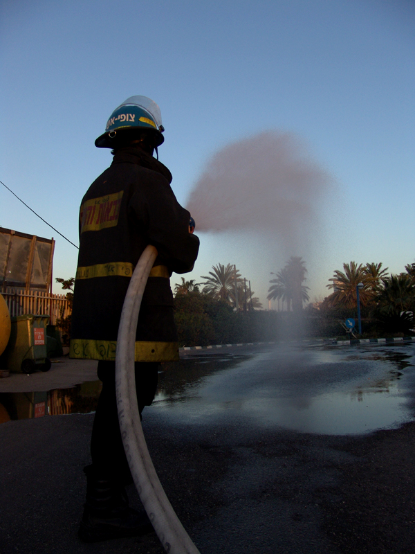 צופה אש באימון